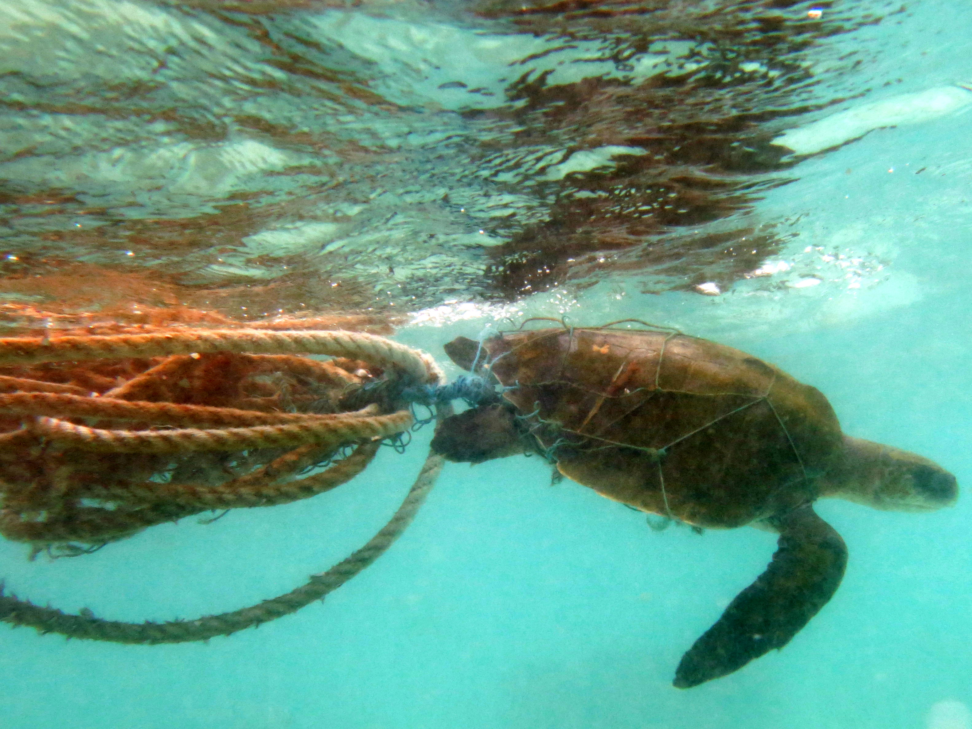 Une tortue olivâtre (Lepidochelys olivacea) prise dans un filet dérivant aux Maldives (Landaagiraavaru, atoll de Baa).